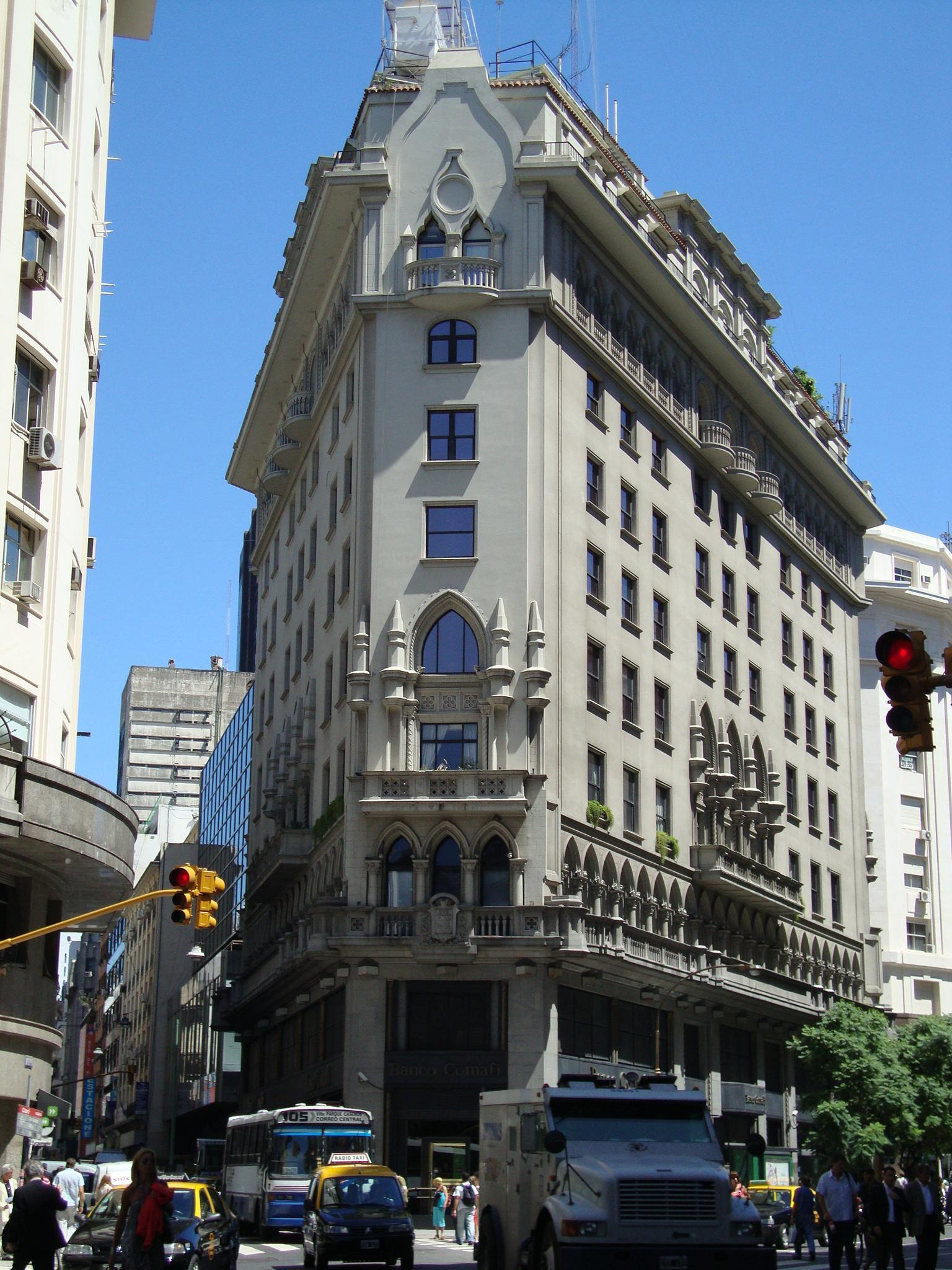 Edificio de la Compañía de Navegación Italia-América, hoy sede del Banco Comafi